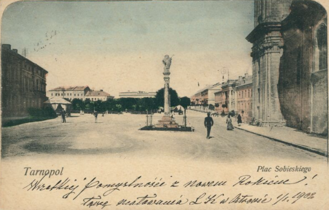 Площа Собеського в Тернополі, 1902 рік. Нині Майдан Волі.